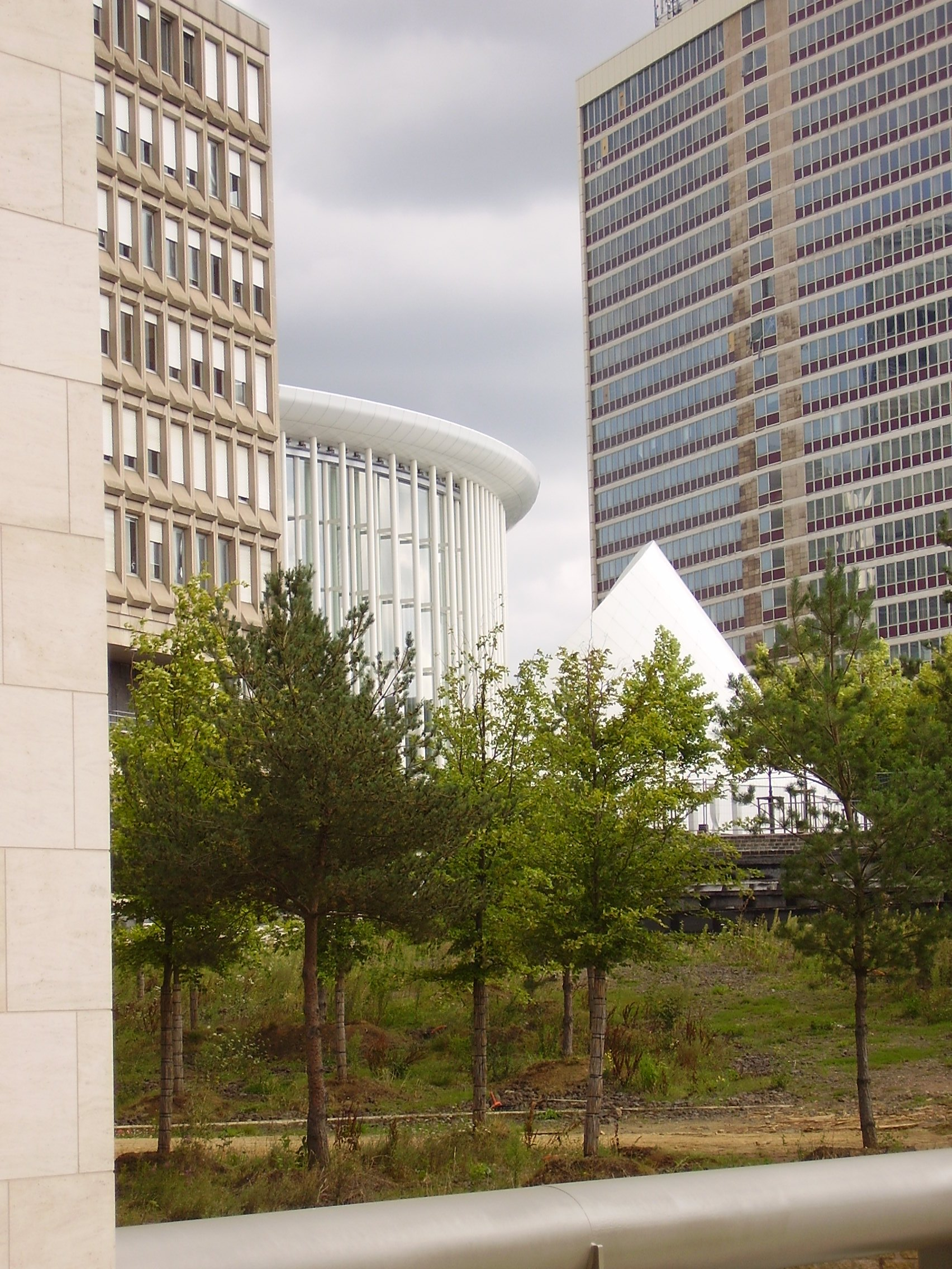 Europaviertel (Luxemburg)